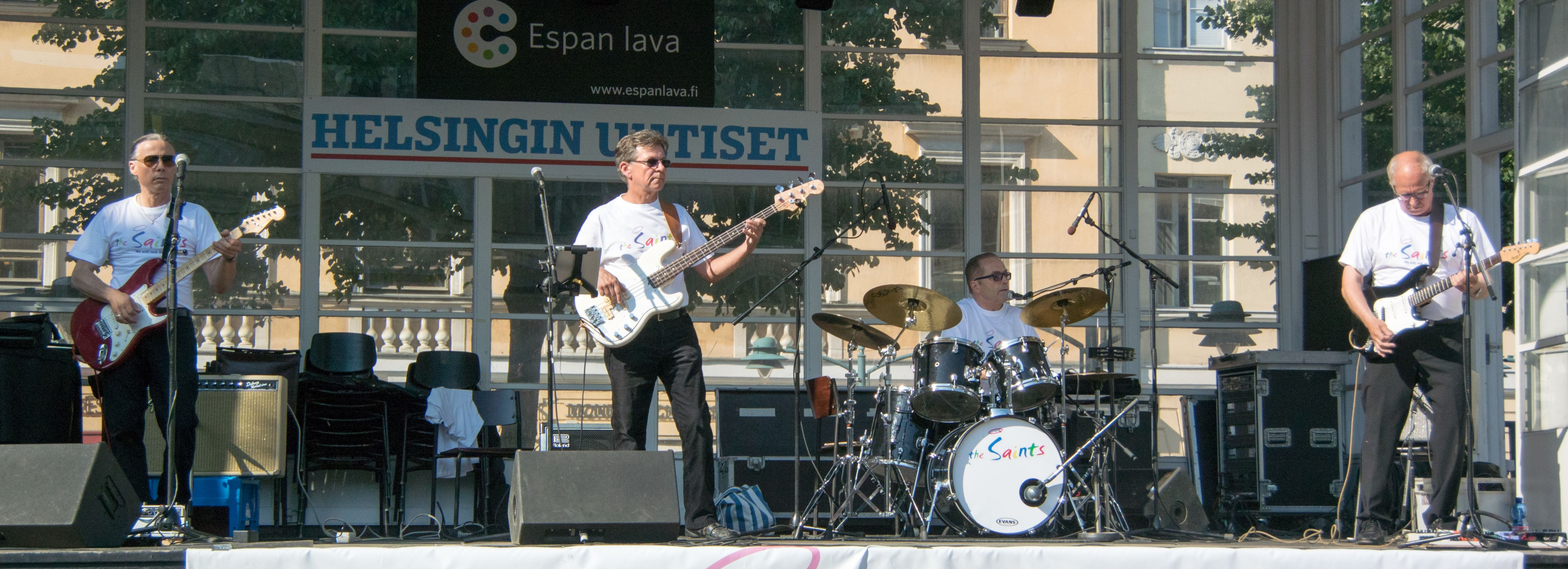 The saints suomalainen kitarayhtye The Saintsin nykyisessä kokoonpanossa ovat Tom Oliveira (kitara), Esko Larkas (kitara), Kari Erik Korhonen (basso) ja Jukka Nystén (rummut).